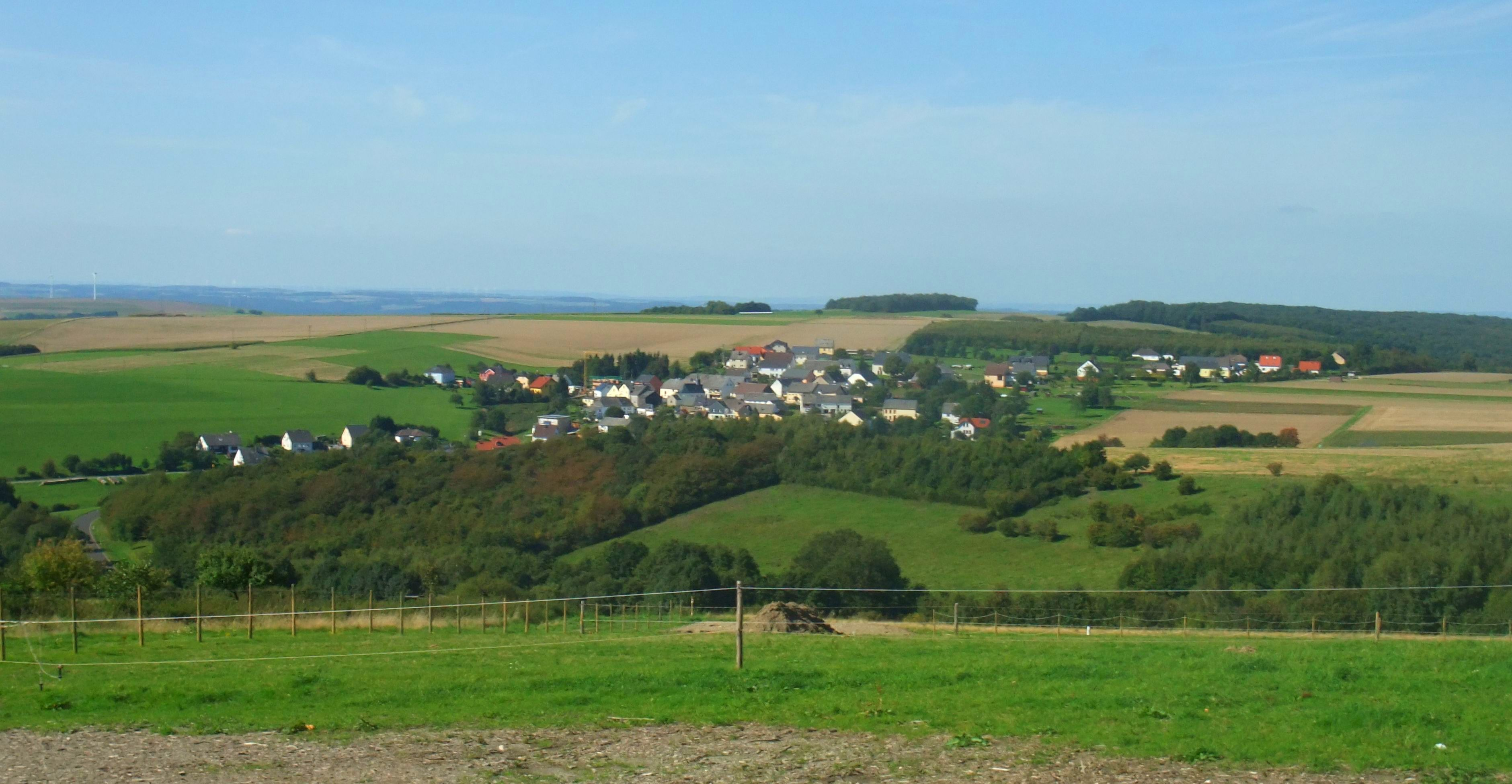 Bonerath